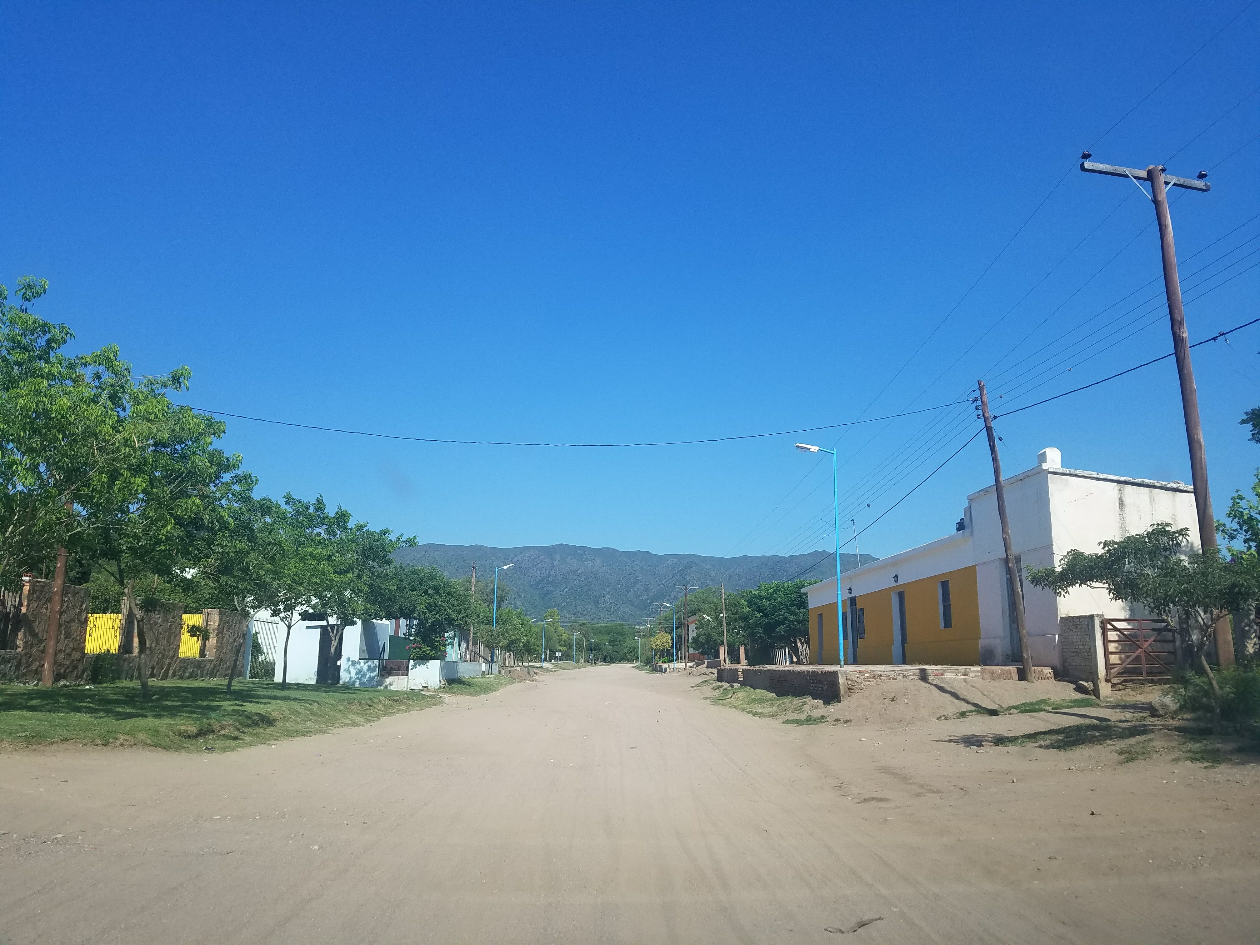 Pueblo Chancani, Provincia de Córdoba, Argentina.